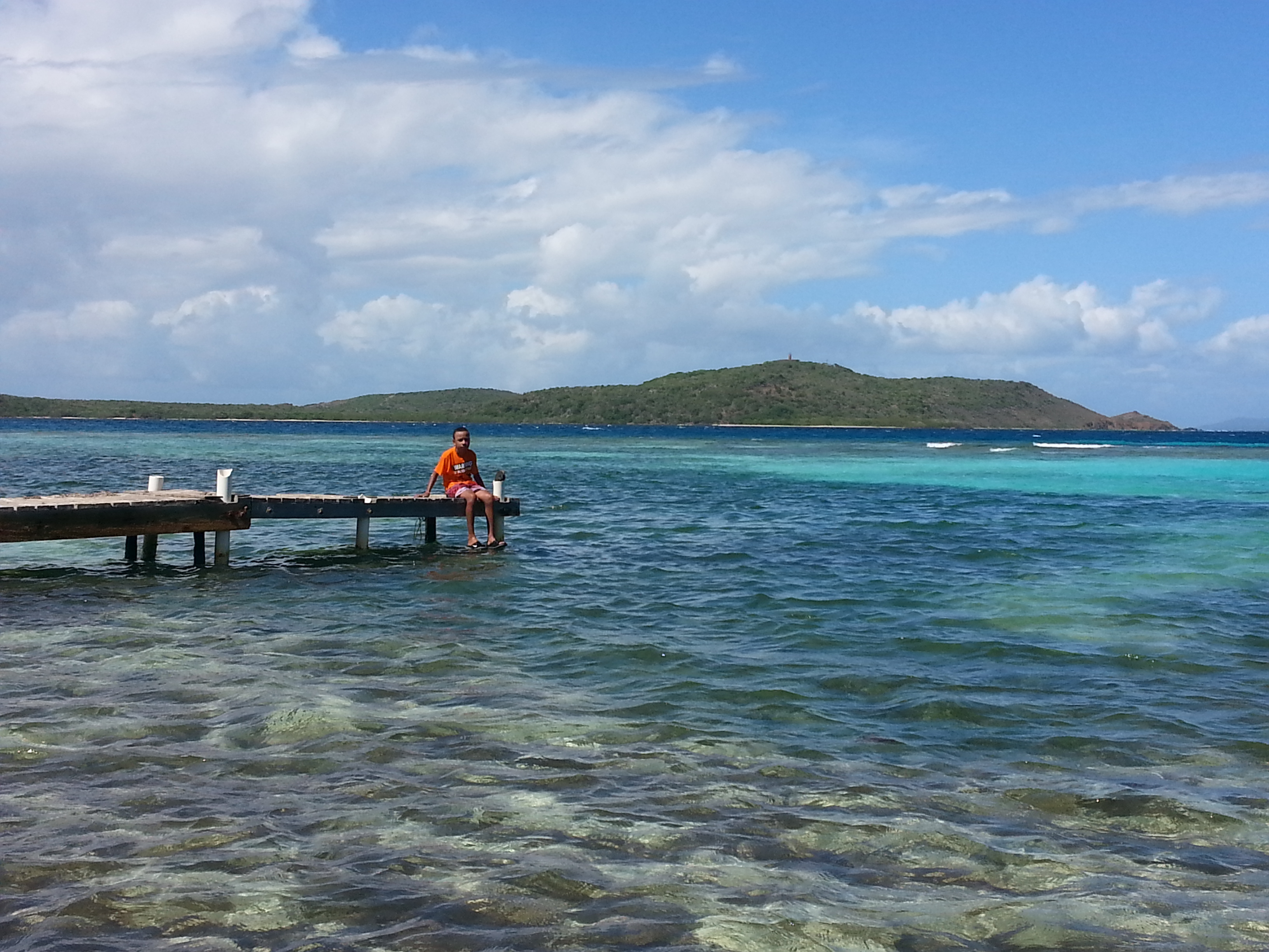 Fraile, Culebra, Puerto Rico